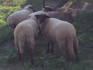 Cigáják (Tápiószele)